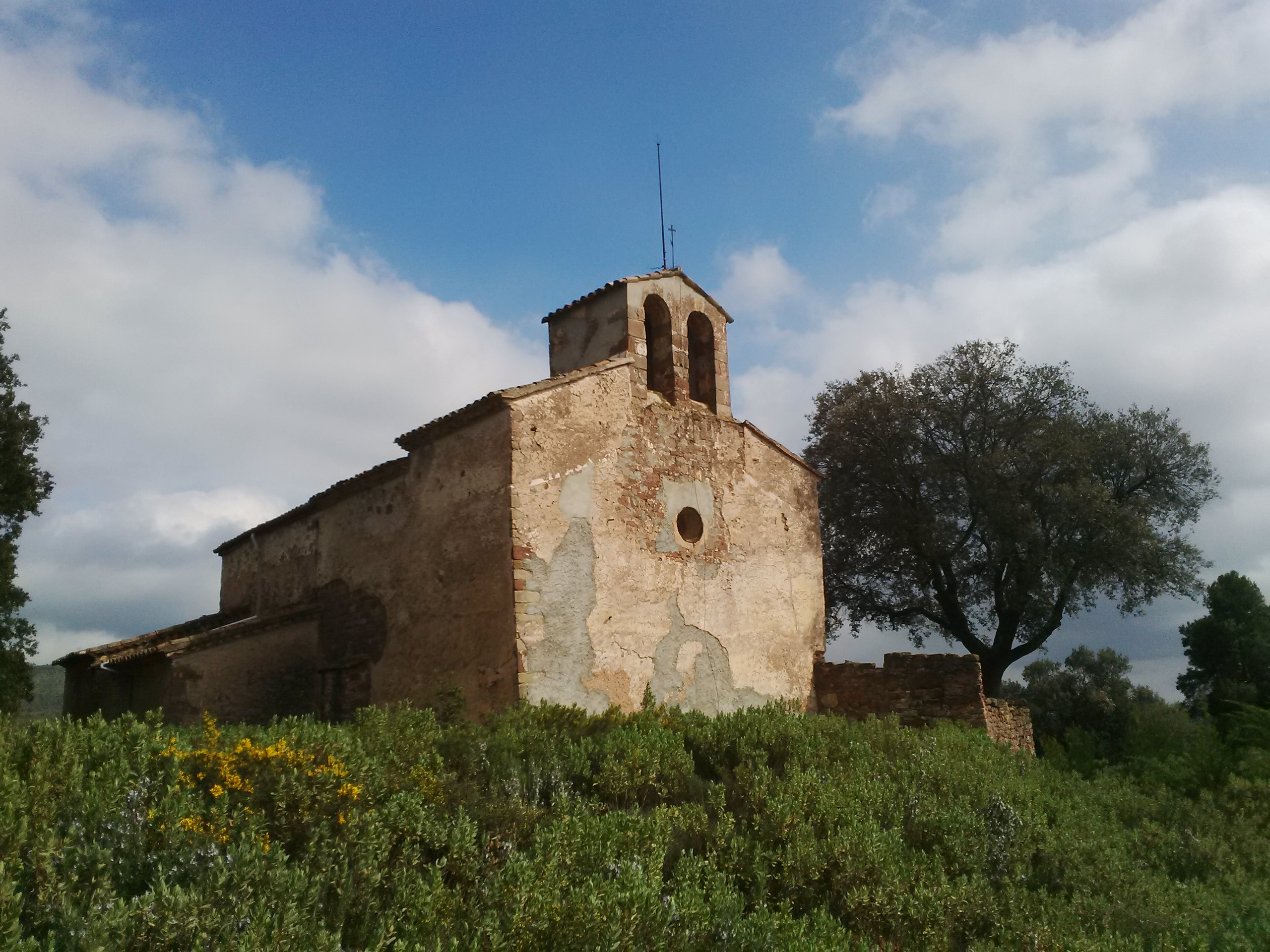 Sant Feliu de Vallcarca, rodalies de Sant Llorenç Savall